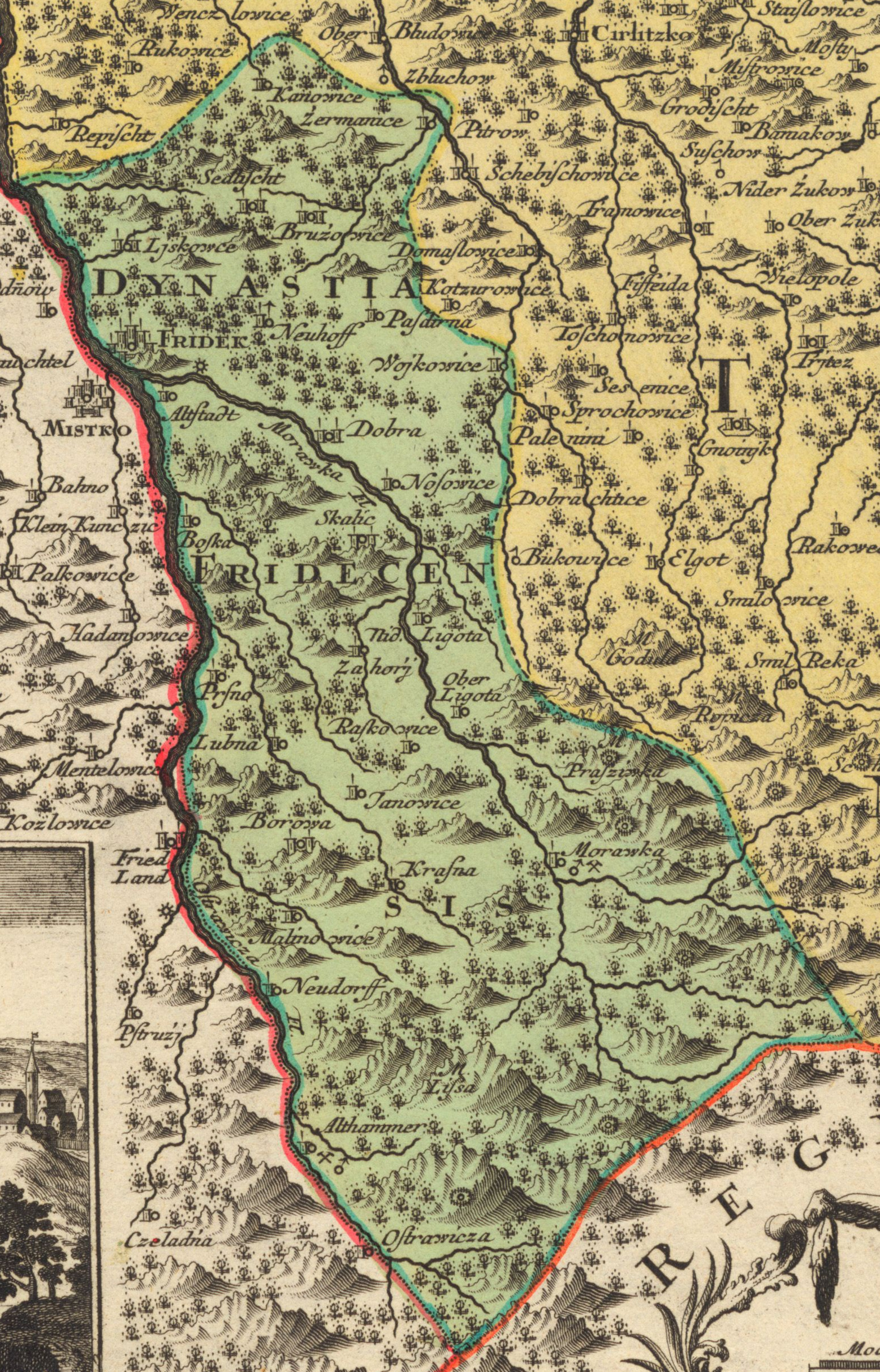 17/18-to wieczna mapa Księstwa Cieszyńskiego autorstwa Mattheusa Seutera - wycięte frydeckie państwo stanowe